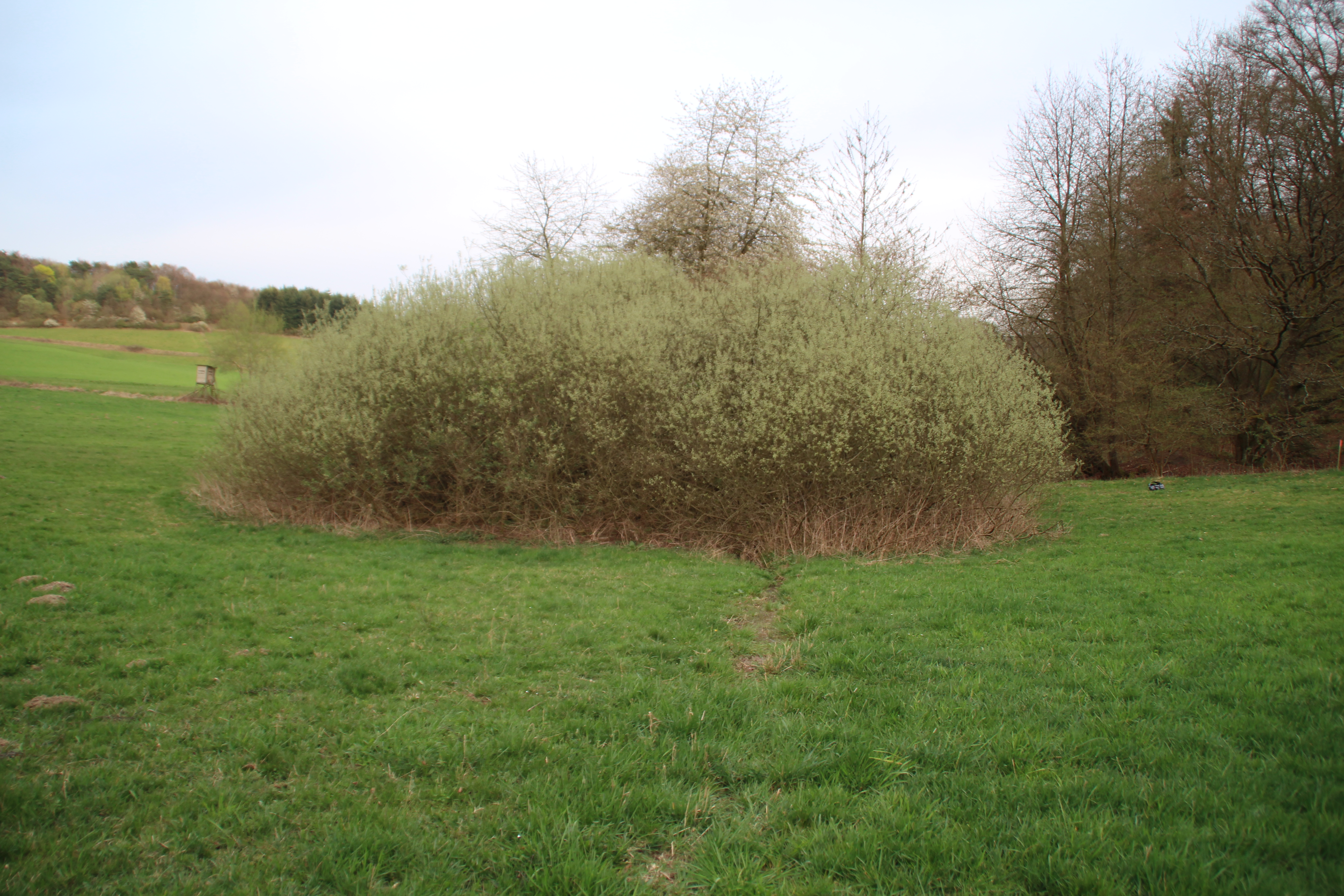 Salzbödequelle